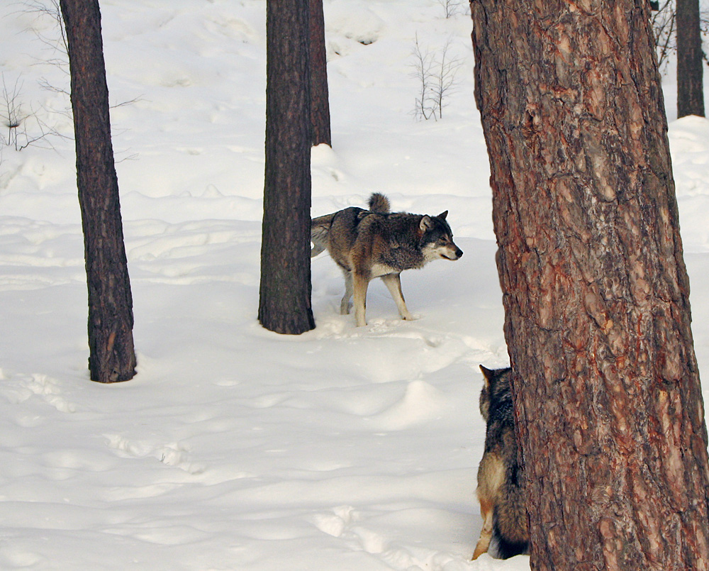 Lobo marcando su territorio mediante sus fluidos corporales. Zoo de Kolmården (Suecia).